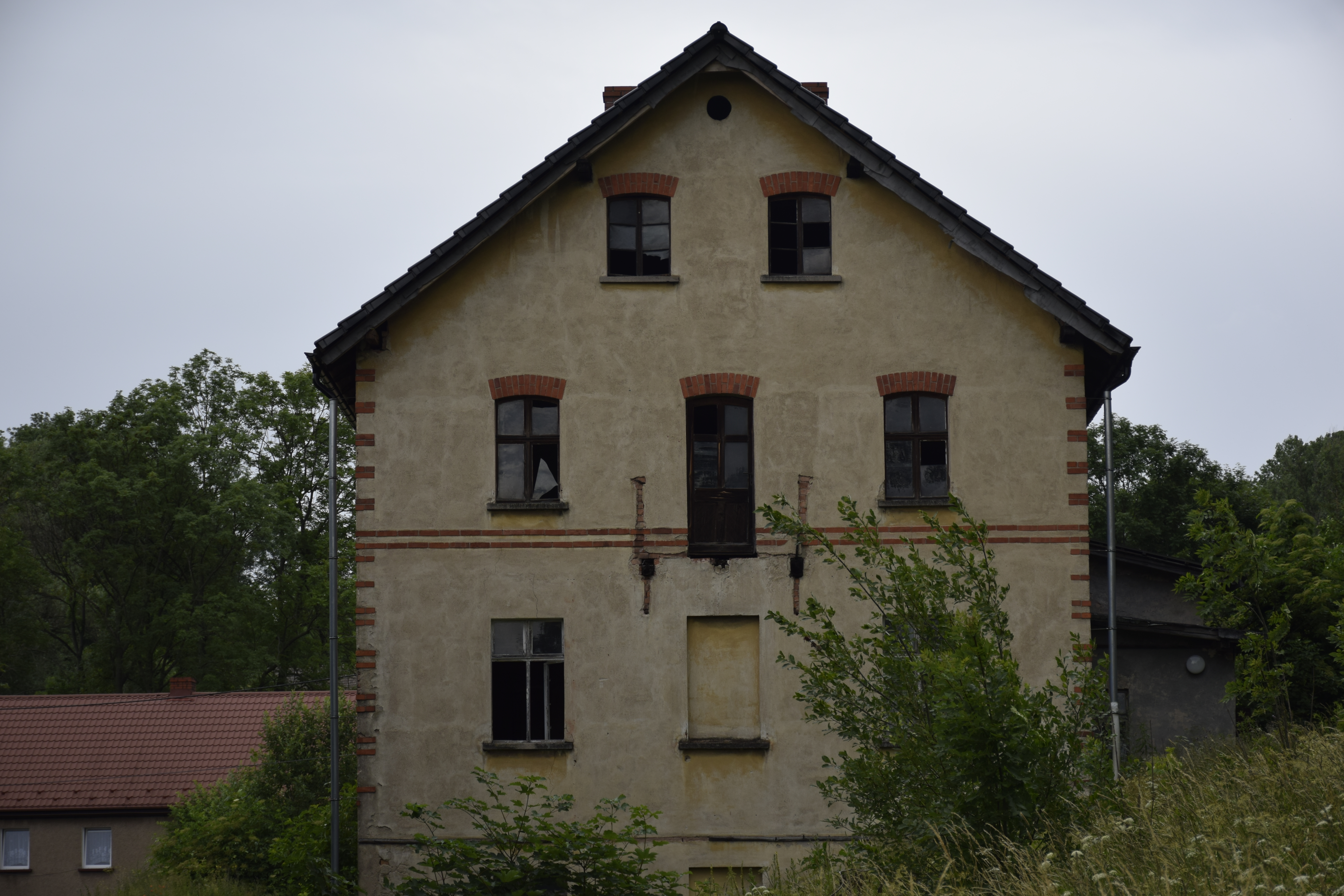 Pastevnik (województwo dolnośląskie). Polska